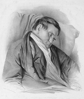 Totenbildnis mit faksimiliertem Autograph des Leipziger Professors Karl Heinrich Ludwig Poelitz (1772—1838)